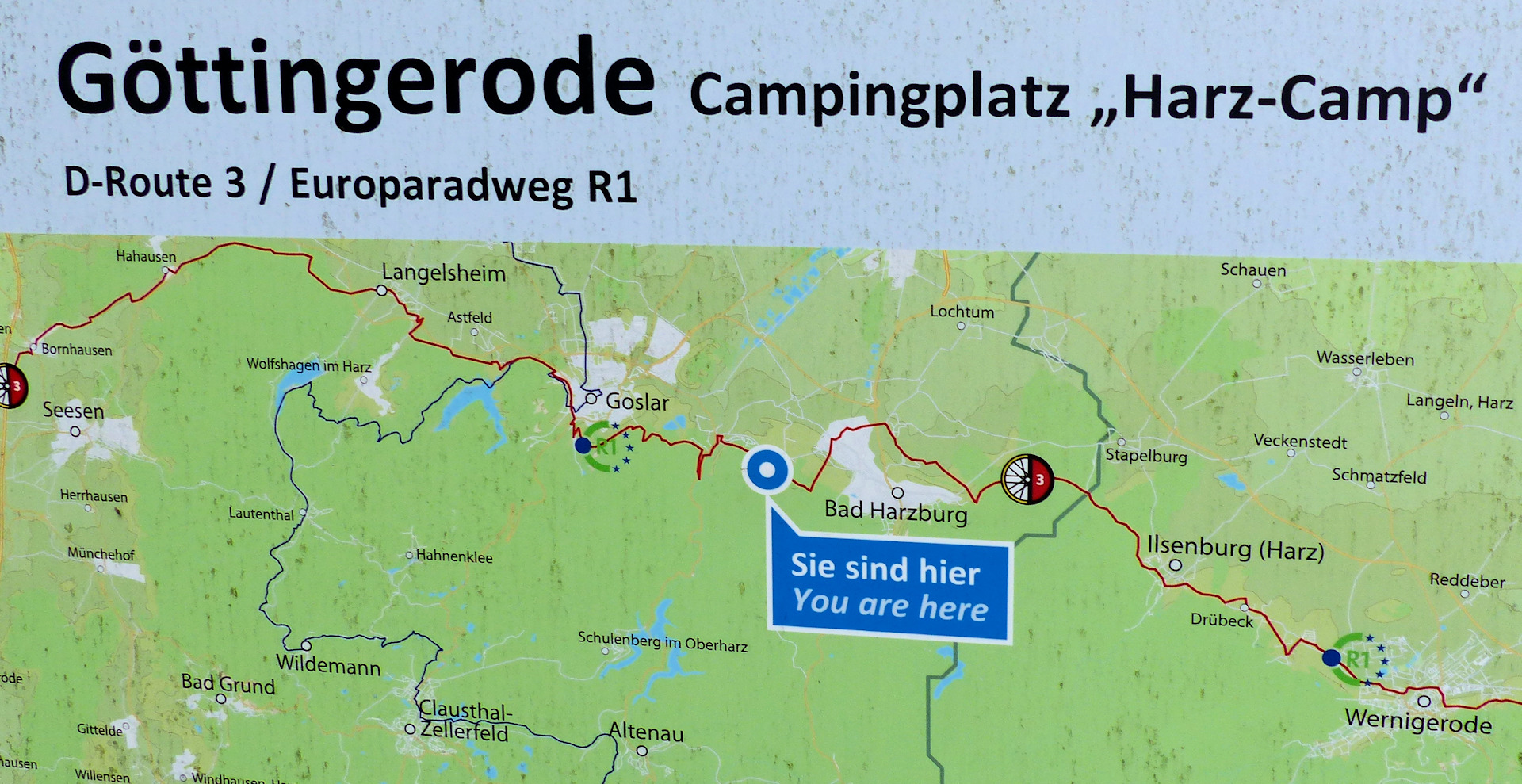 Informationstafel am Radfernwanderweg R1